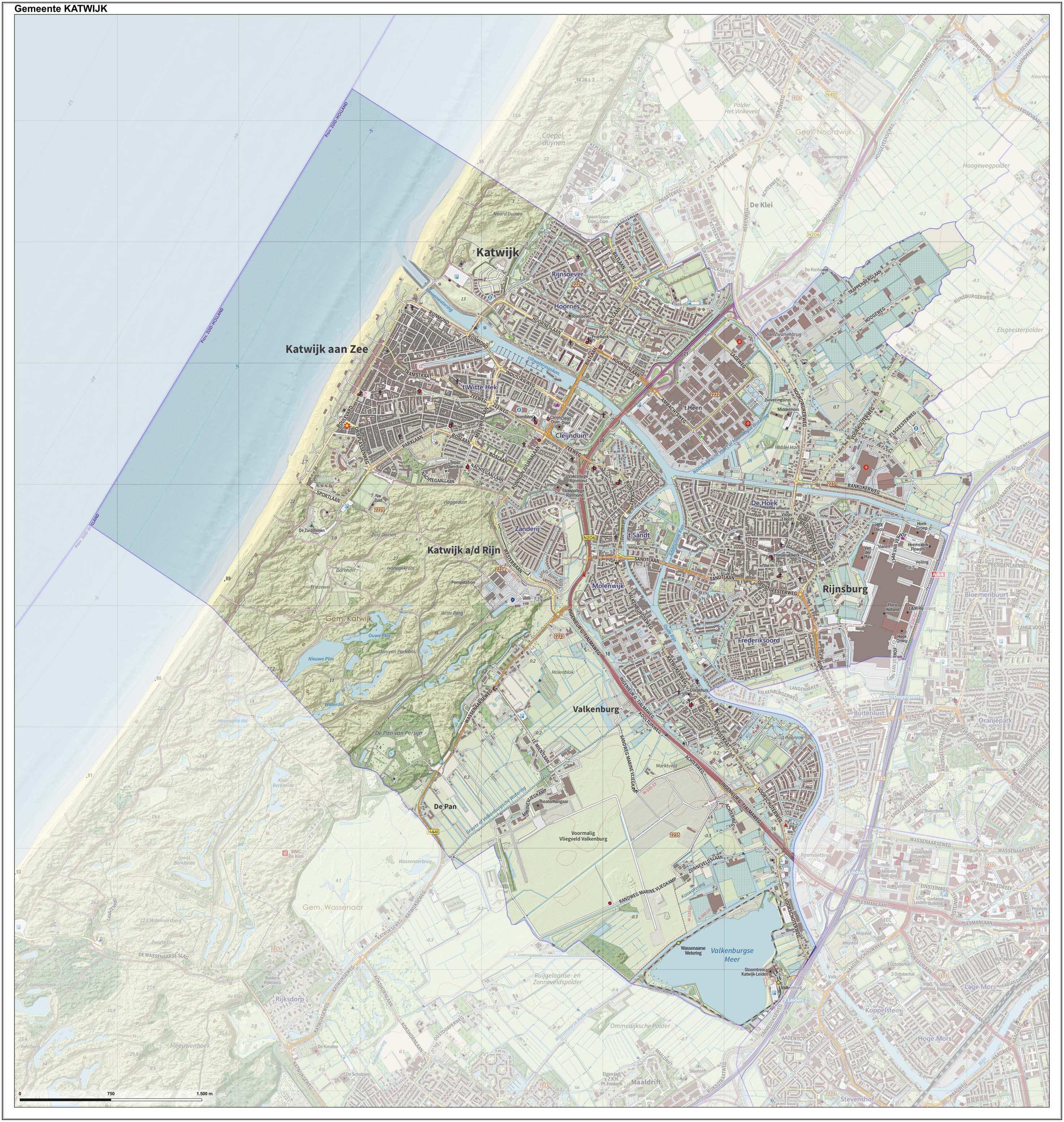 Topografische gemeentekaart. Resolutie: 400 pixels/km. Kaartbeeld samengesteld uit de open geodata van de Top10NL en Top25namen (Kadaster), Creative Commons-BY licentie. Gebouwvlakken uit open geodata BAG extract. Wegen uit de OpenStreetMap, OpenStreetMap community. Reliëfschaduw uit de Actuele Hoogtekaart AHN2. Samenstelling en kleurenschema: Jan-Willem van Aalst, met QGIS. Zie ook de Legenda.